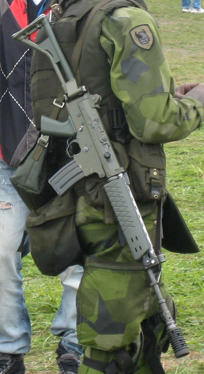 Ak 5 (standard) seen here.